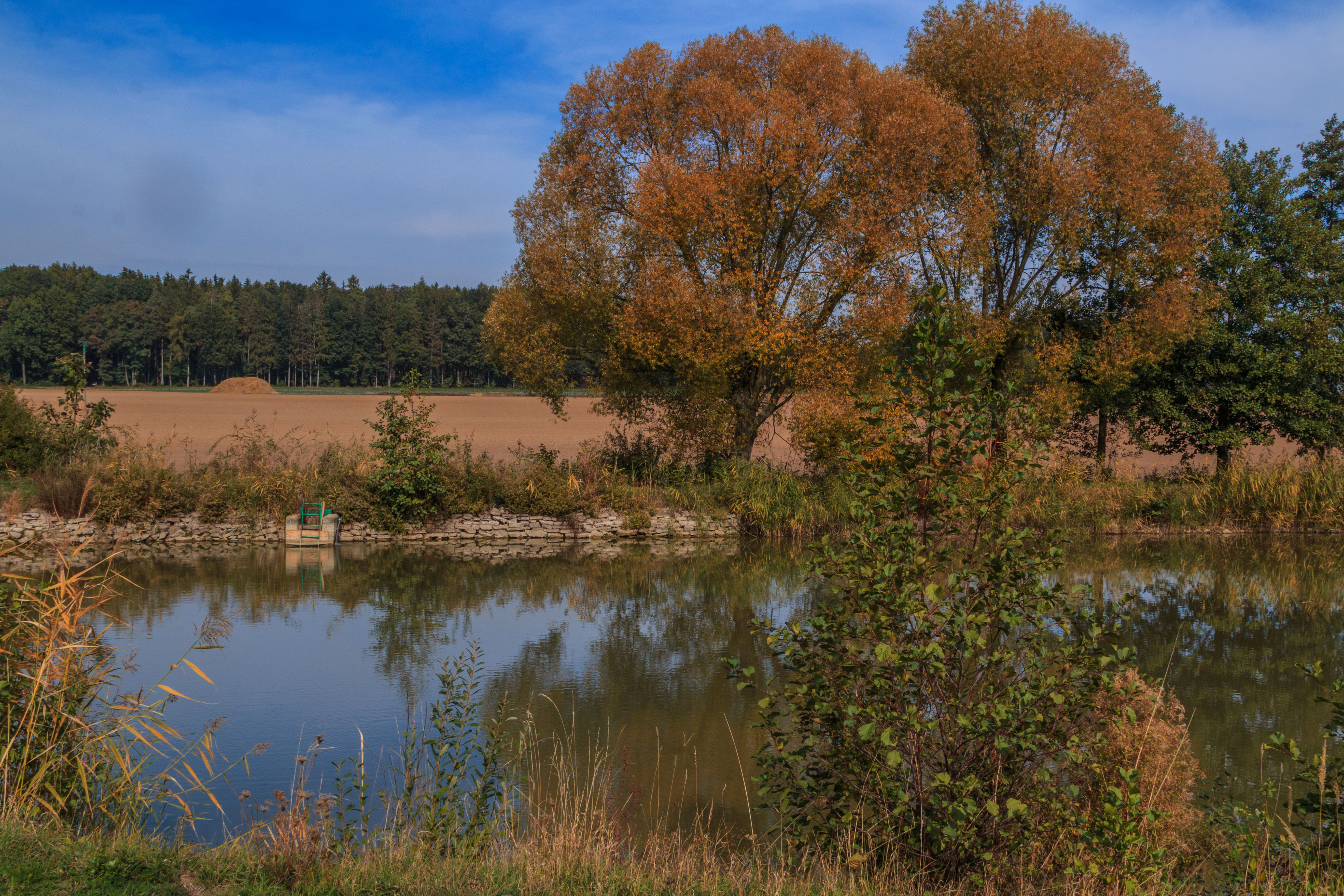 Kohoutův rybník v Novém Radostově Project: Vodstvo.